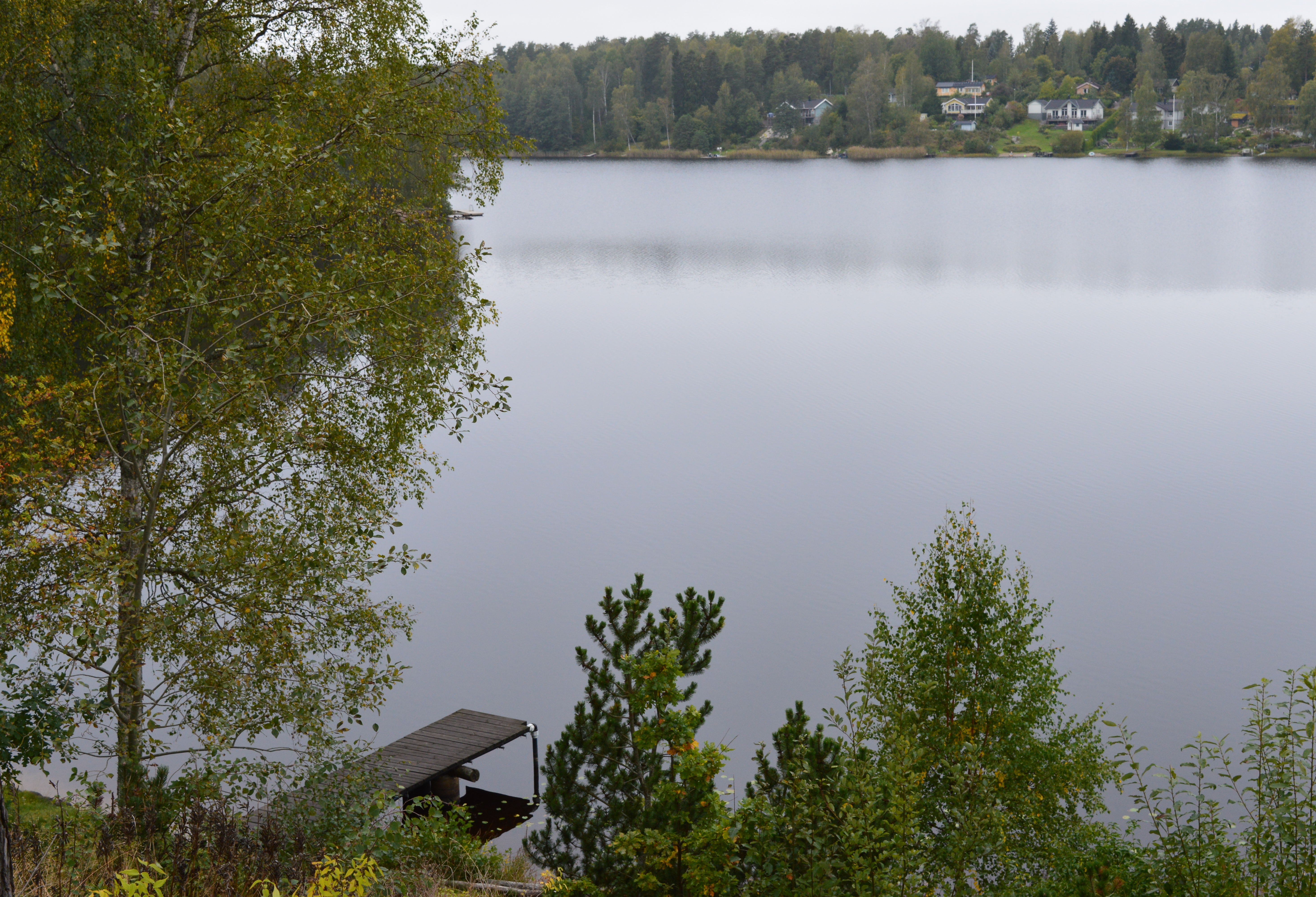 Borsöknasjön i Eskilstuna kommun.